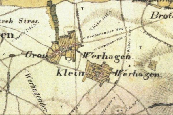 Kartenaufnahme der Rheinlande 1804/05